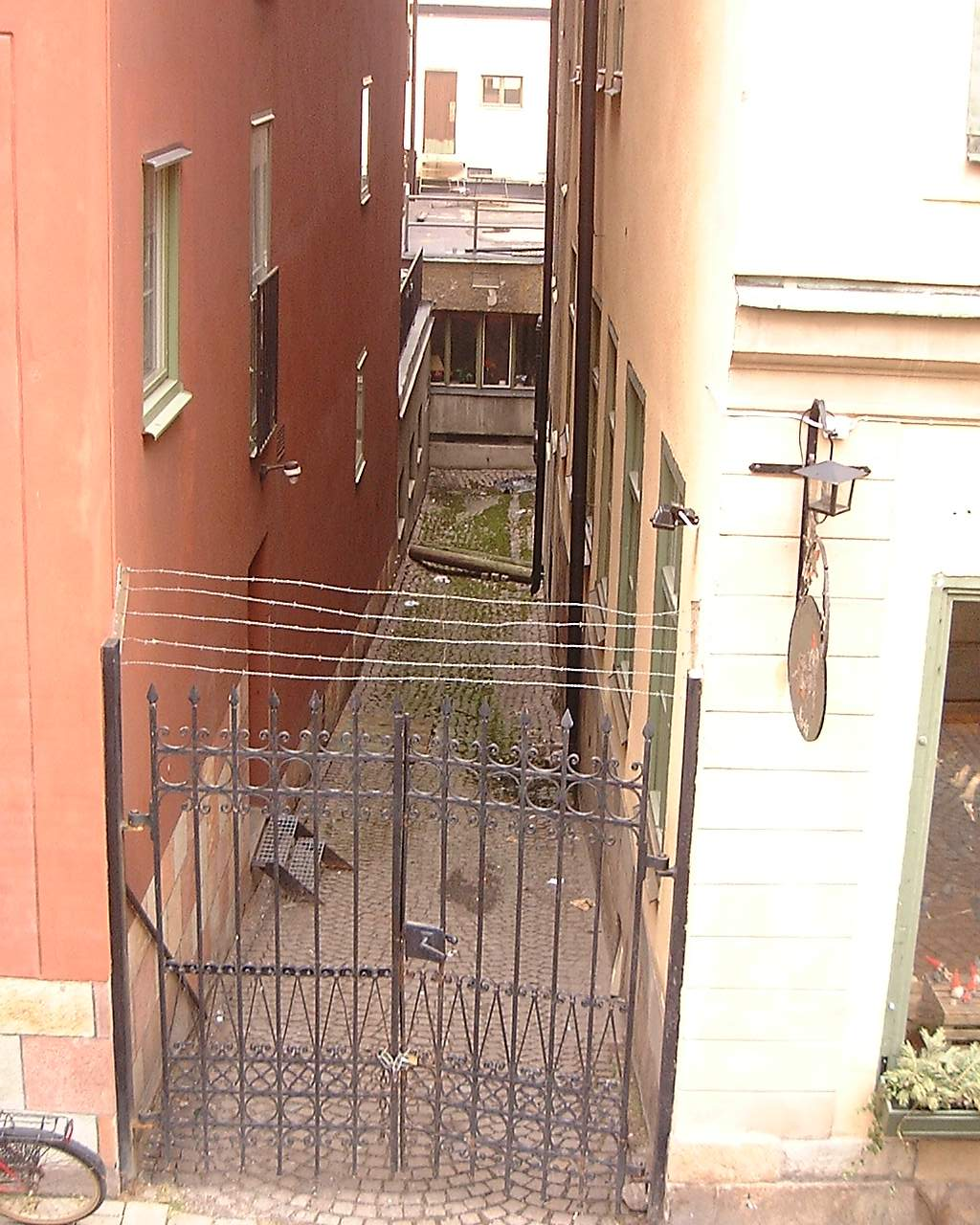 Fru Gunillas Gränd viewed from Benickebrinken, Gamla stan, Stockholm.